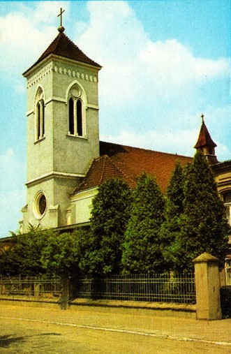 Kościół w 1987 roku